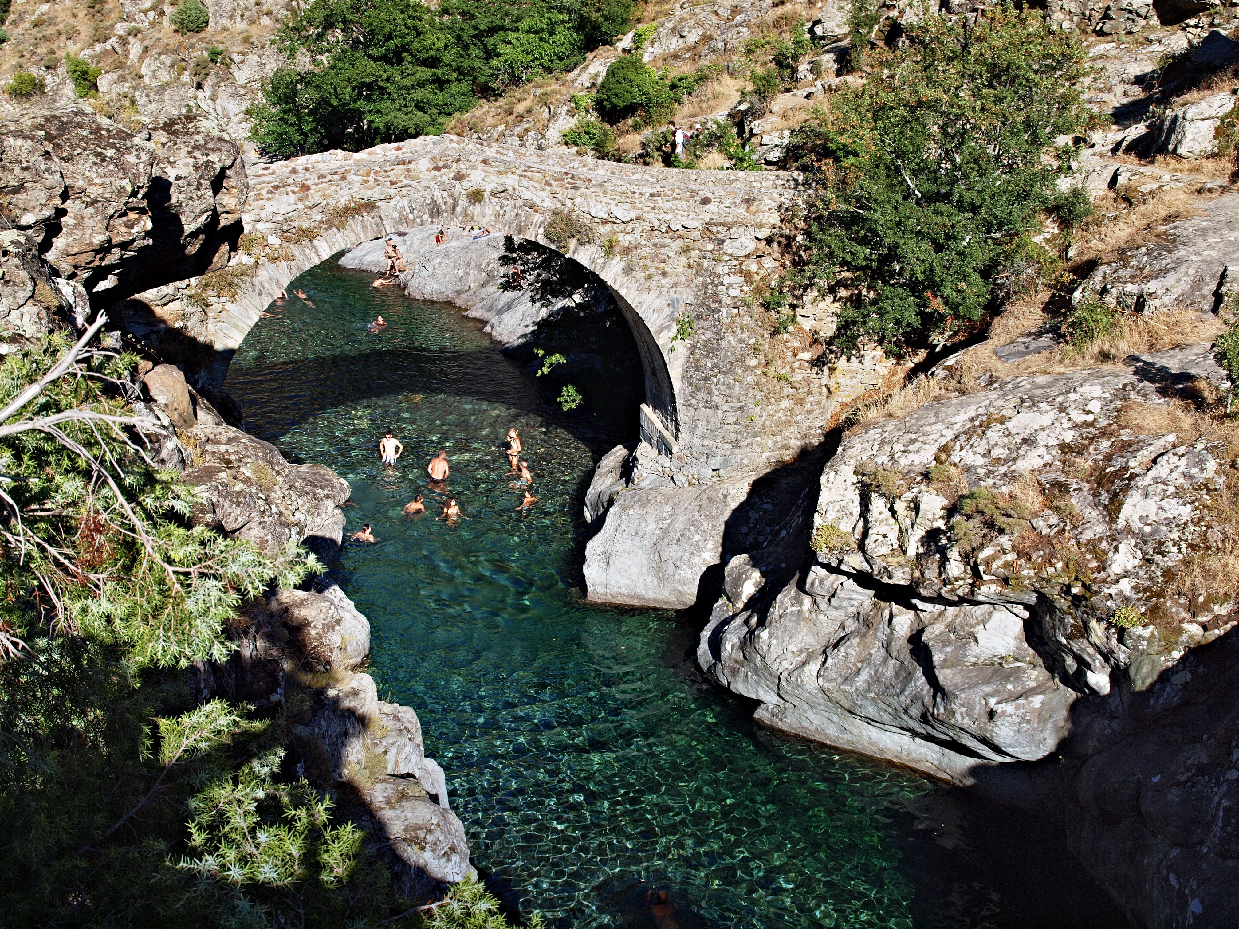 Asco (Corsica) - Baignade dans la piscine naturelle sous le vieux pont génois